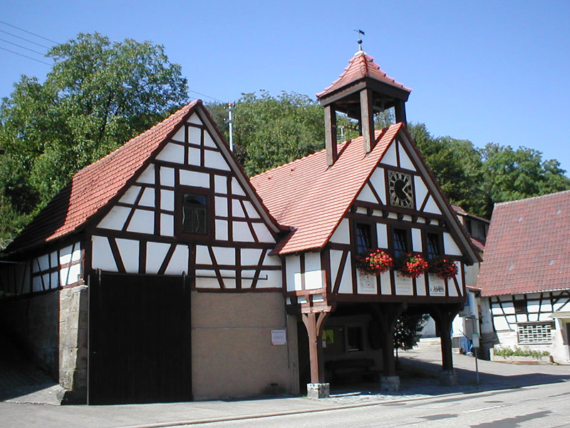 Beilstein-Etzlenswenden, „Kelterle“ in der Ortsmitte mit Glockenturm, Versammlungsraum und Bushaltestelle, erbaut 1981 anstelle der alten Kelter, die dem Straßenbau zum Opfer fiel.